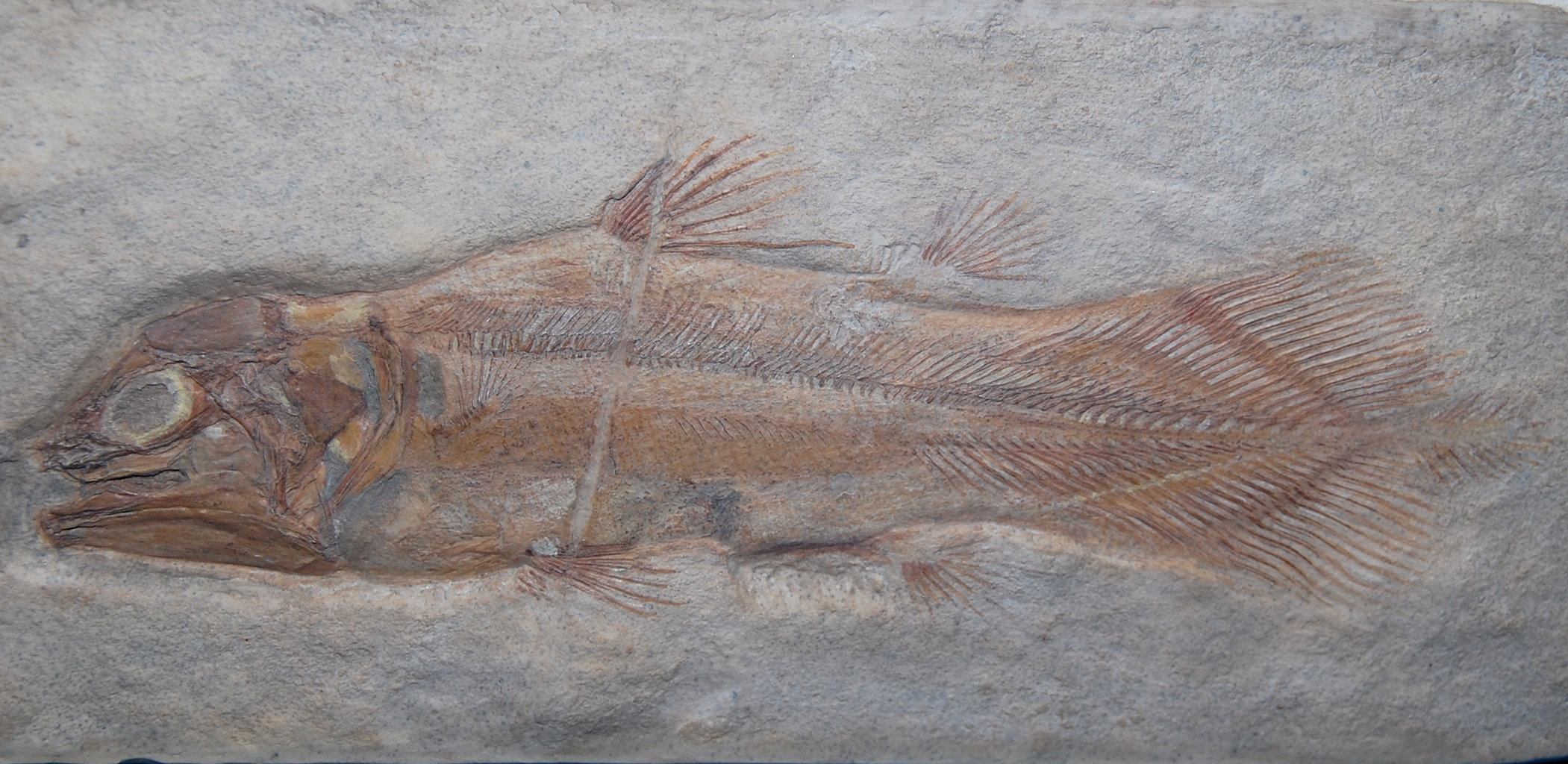 Naturhistorisches Museum Wien